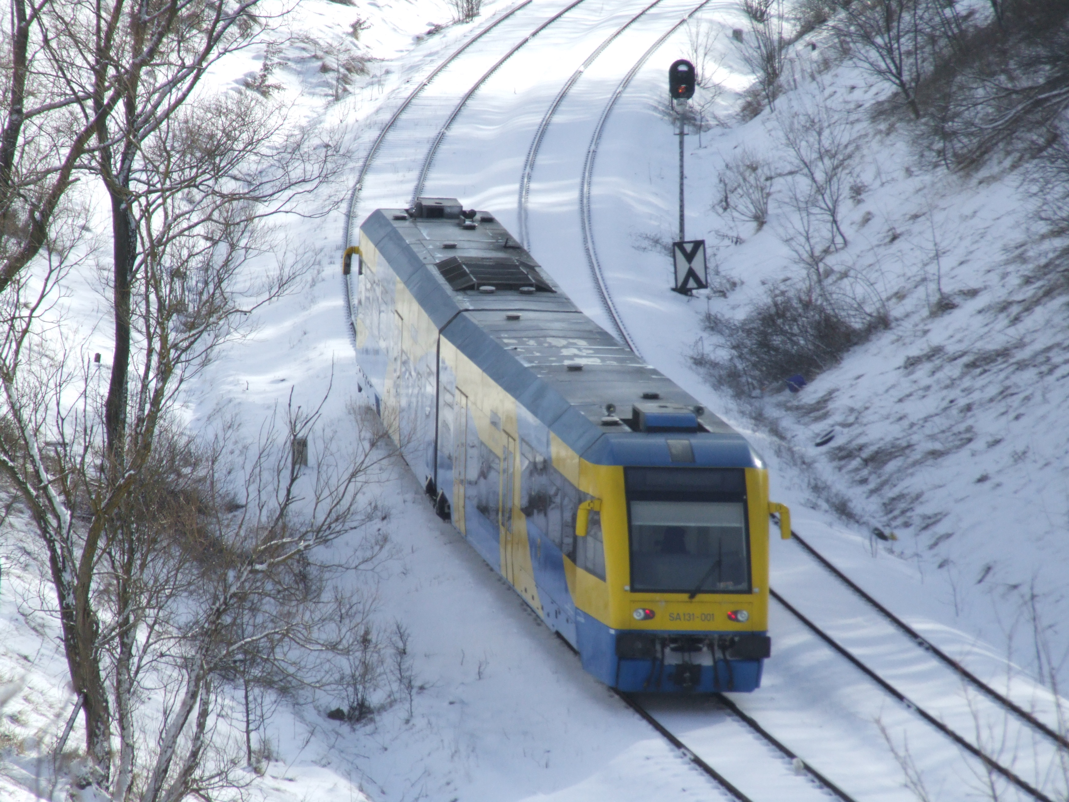 Trasa Gdynia-Kościerzyna